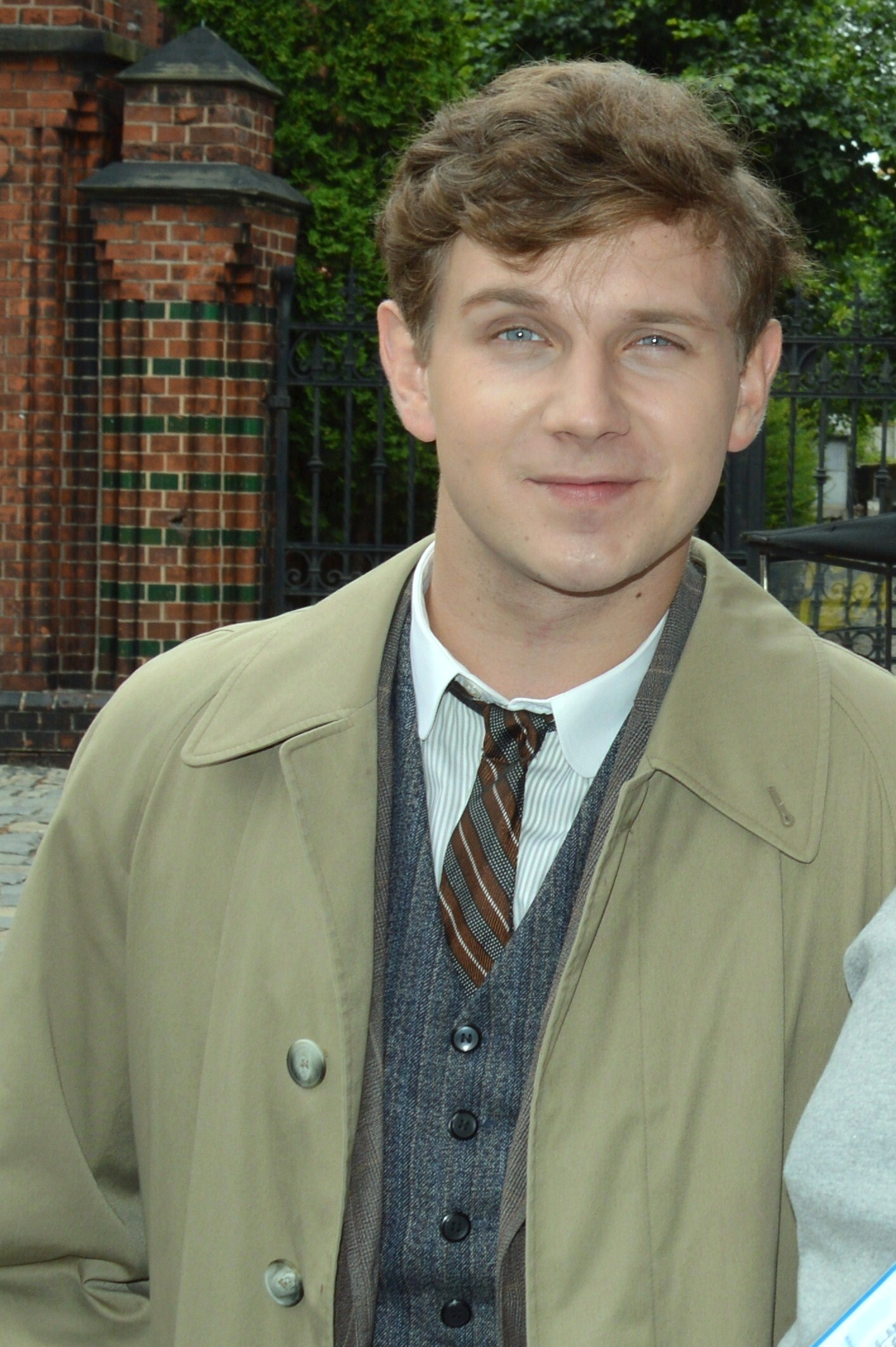 Antoni Królikowski jako młody Eugeniusz Bodo na planie serialu "Bodo".